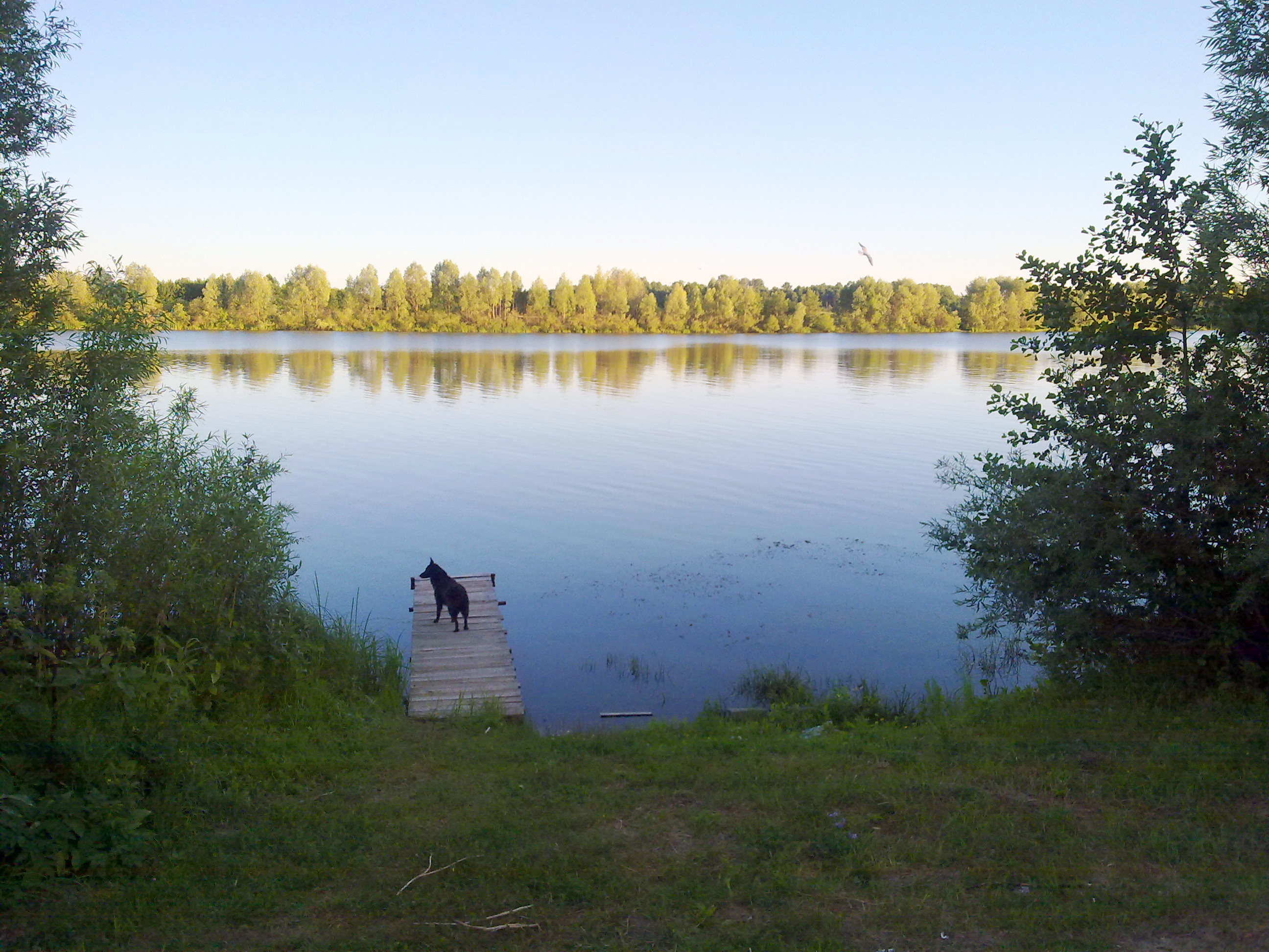 Чувашия, Ядринский район, река Сура